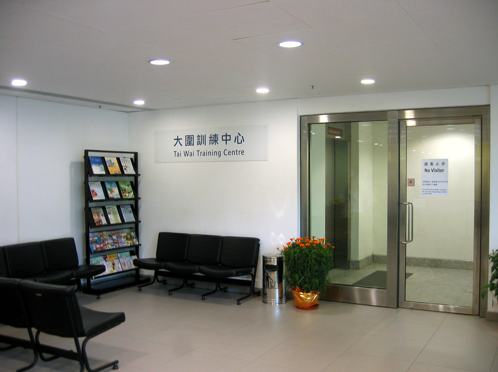 Tai Wai Maintenance Centre Control Room 大圍車廠